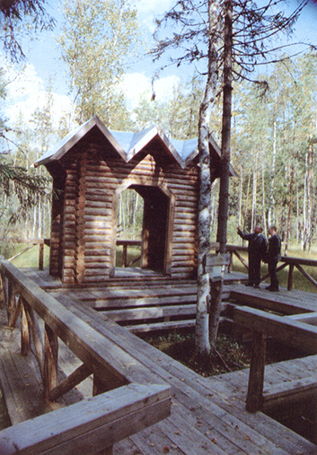 Первый памятный ансамбль на истоке Западной Двины, сооружённый в 2001 г. Разрушен бураном зимой 2010-2011 гг.